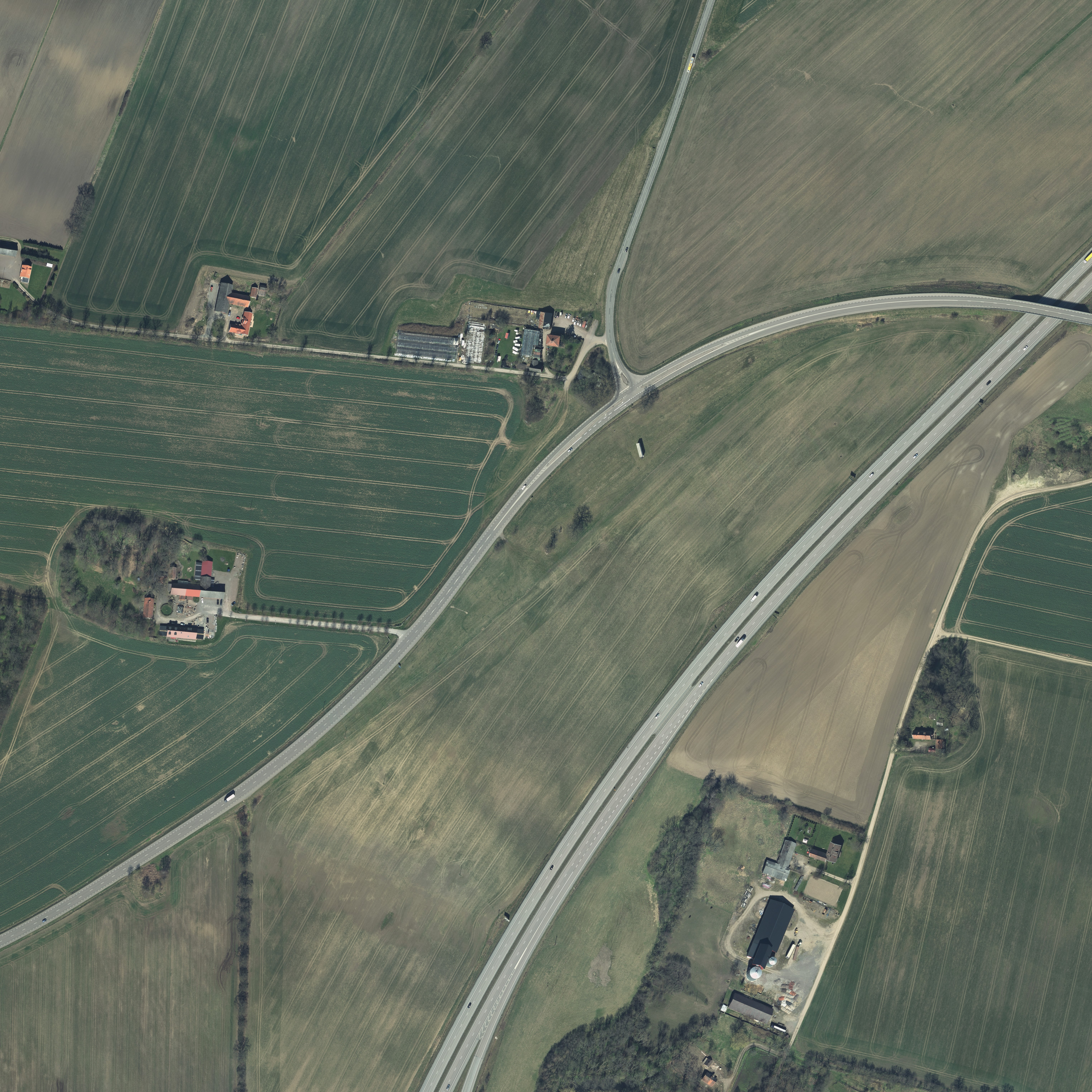 Platsen för Trafikplats Djurhagshus